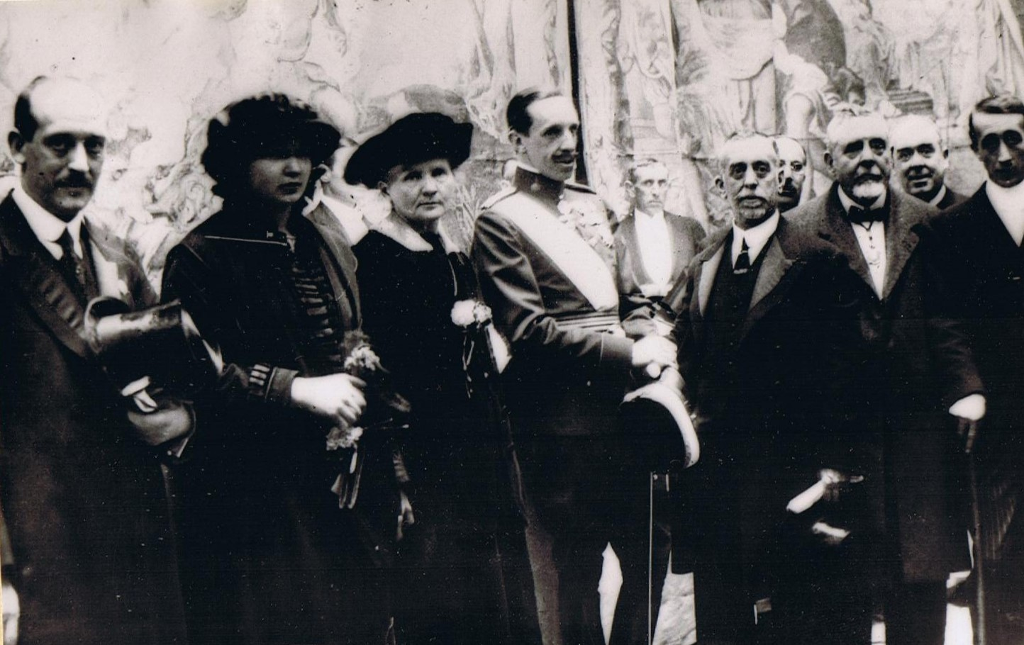 Celedonio Calatayud junto a M.Curie y su hija, con el Rey Alfonso XIII durante el I Congreso Nacional de Medicina, celebrado en Madrid en 1919